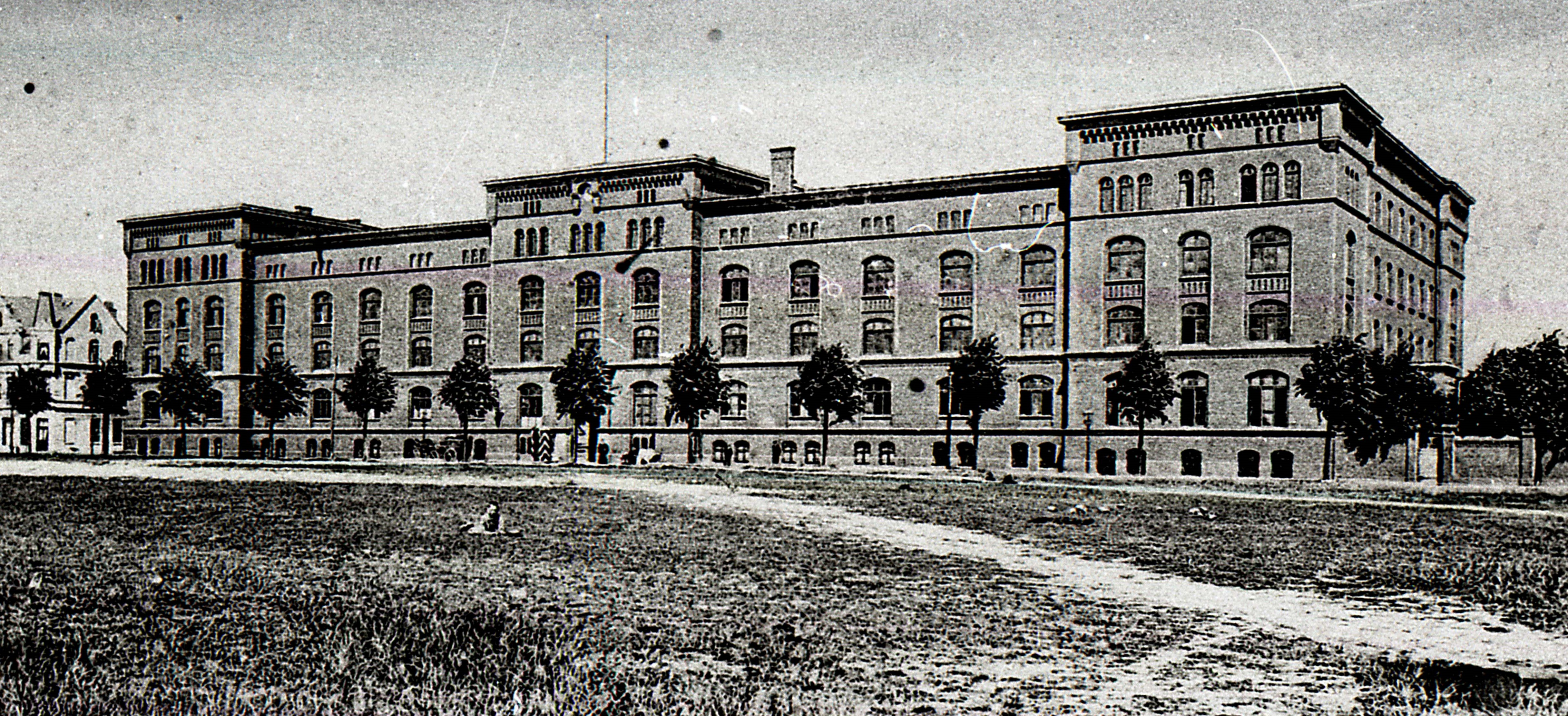 Postkarte mit der Kaserne der Matrosenartillerie in Lehe